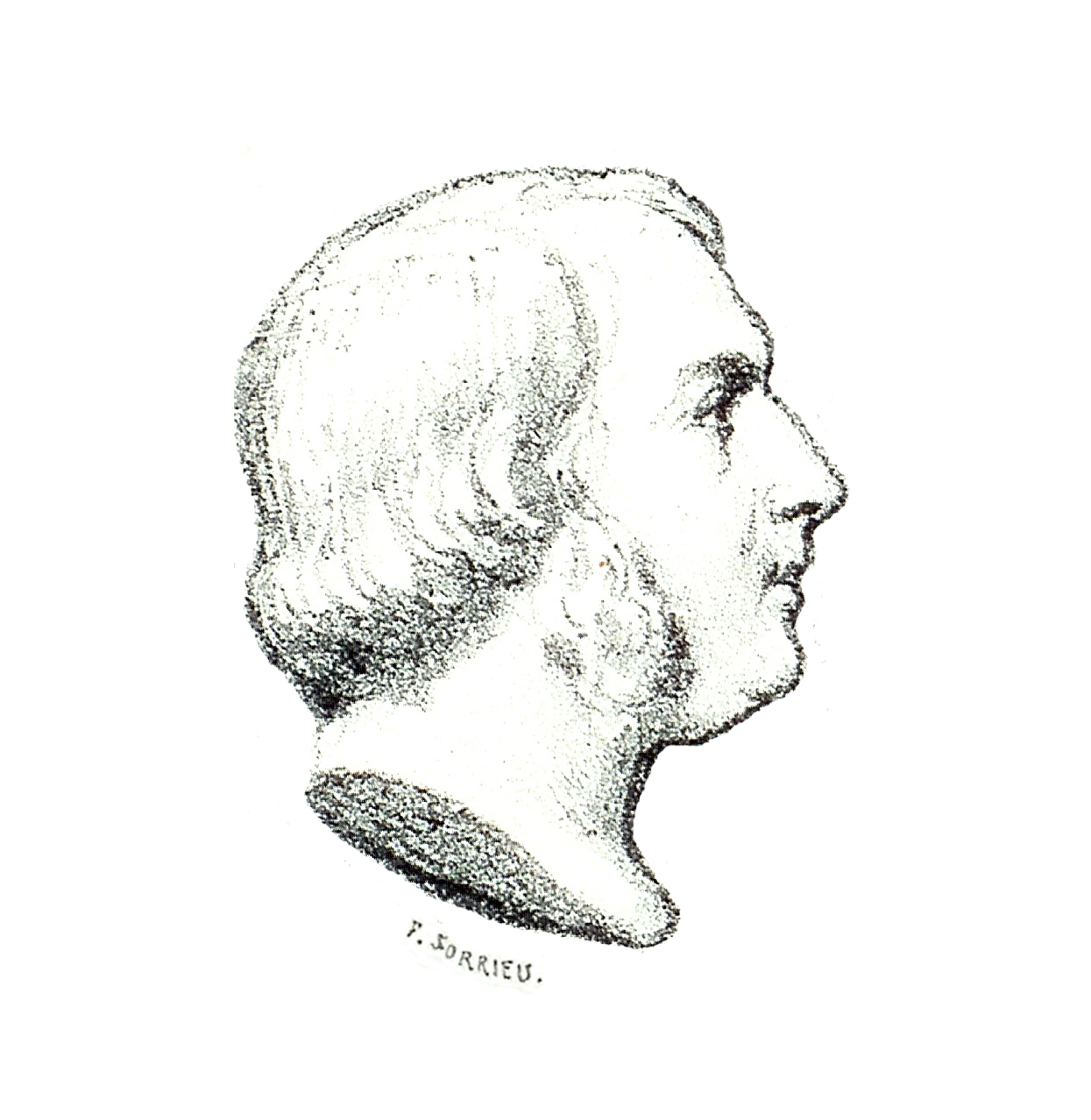 Portrait de Louis Clapisson par Frédéric Sorrieu